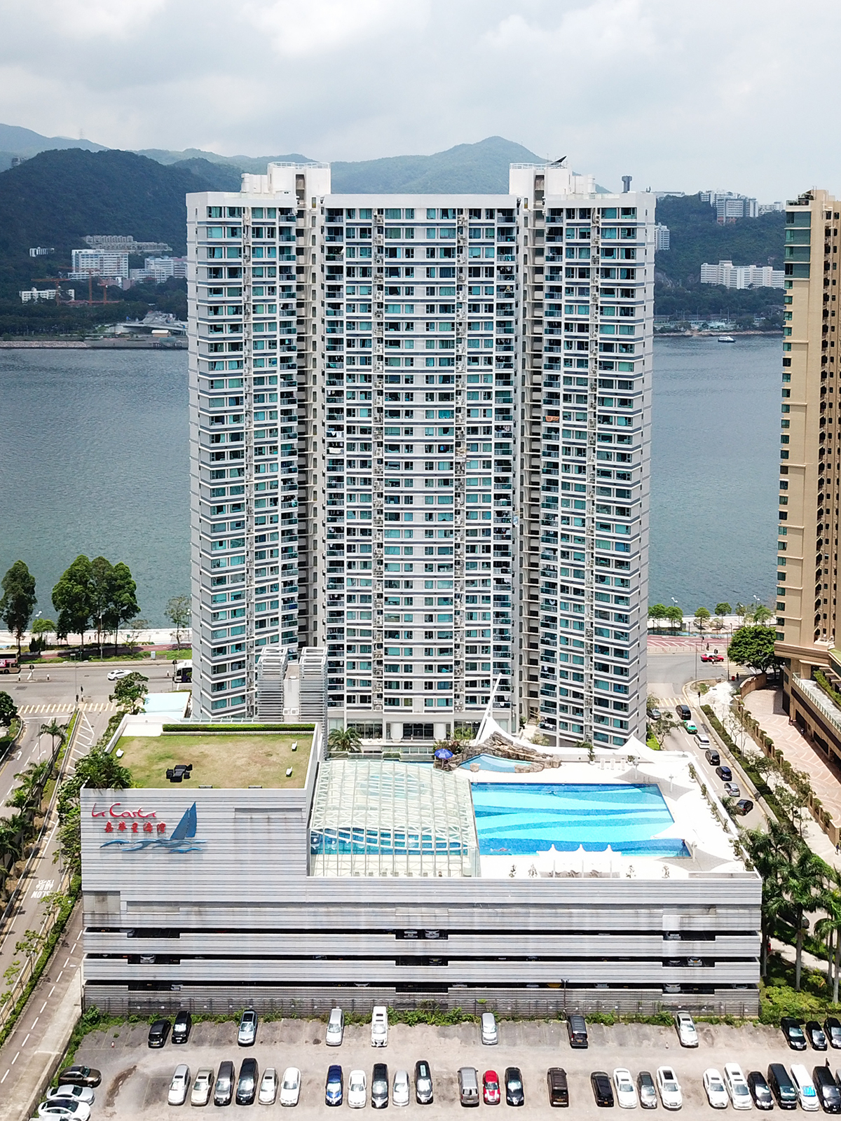 LaCosta